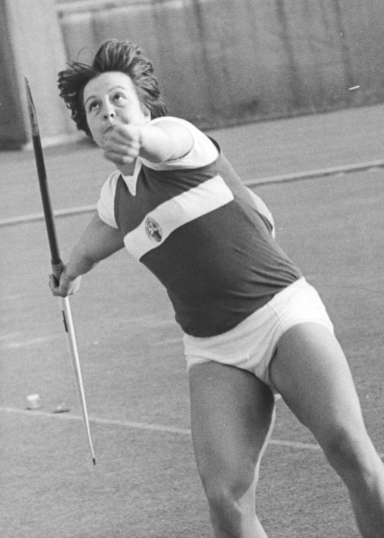 Ute Honmola ADN-ZB Thieme 27.05.1979 K.-M.-Stadt: DDR-Speerwerferin Ute Honmola (SCK) errang am 26.05.1979 während der Wettkämpfe um den SC-Pokal der Leichtathletik mit 66,44 m Jahresweltbestleistung.